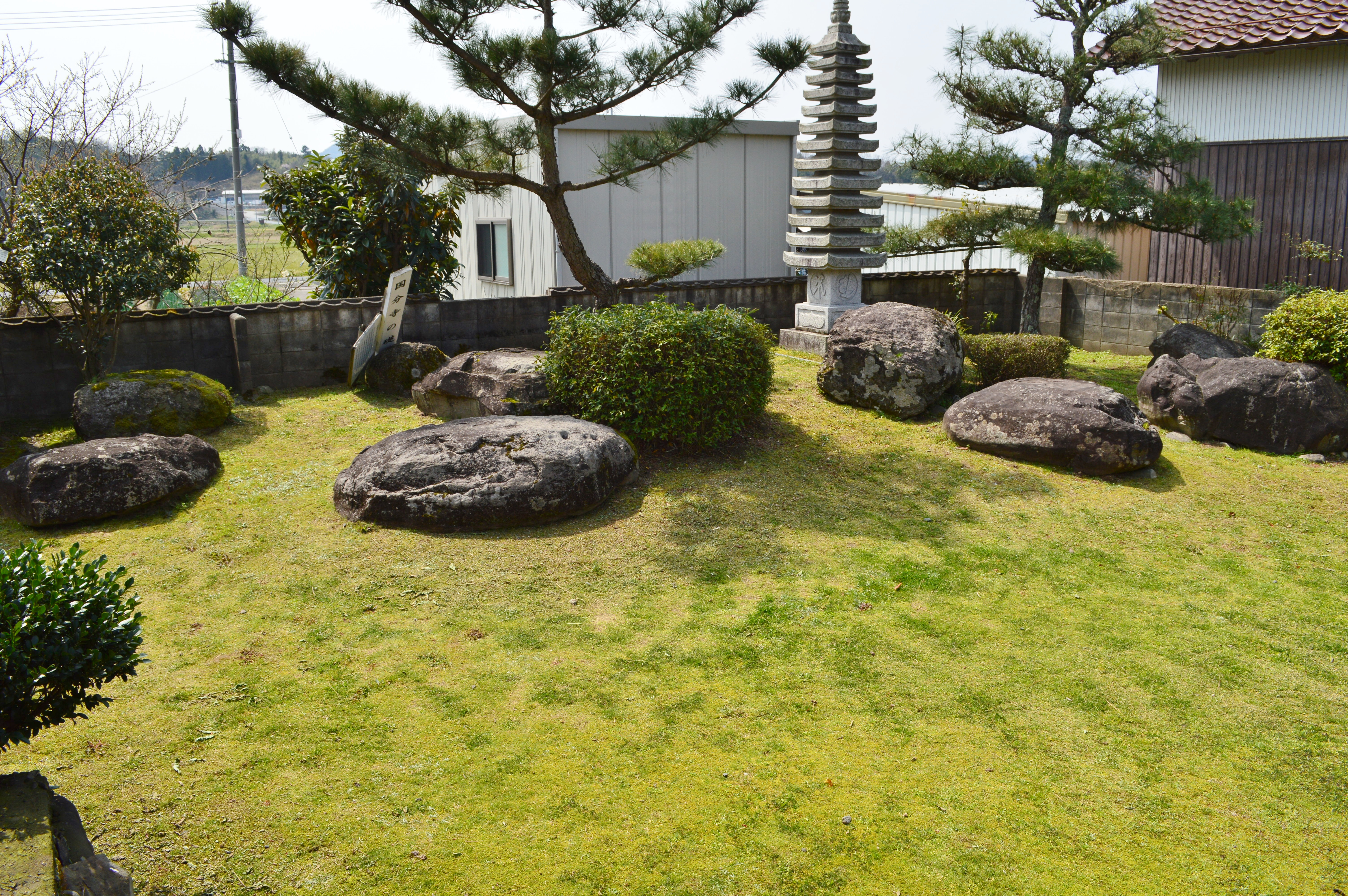 因幡国分寺 国分寺の礎石 Nikon D3200